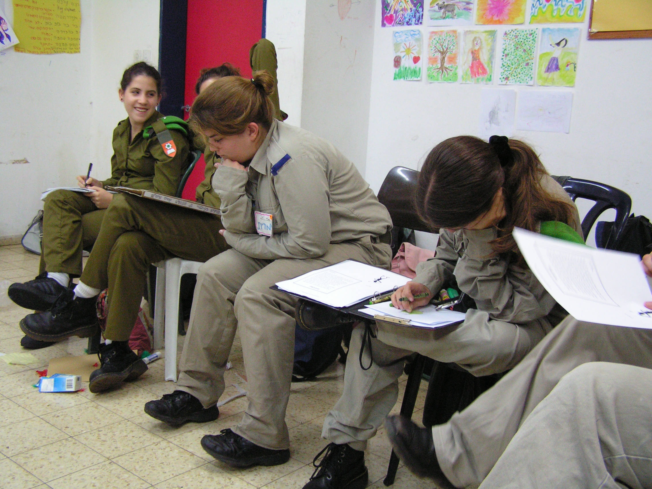 techer soldiers kors